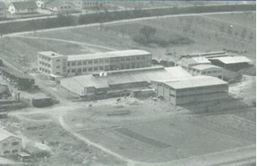 Werk Wertheim 1971